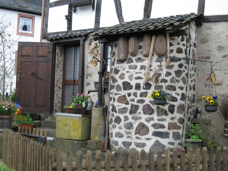 Alte Werkzeuge an einem Schalkenmehrener Bauernhaus Andrea Heck, April 2006